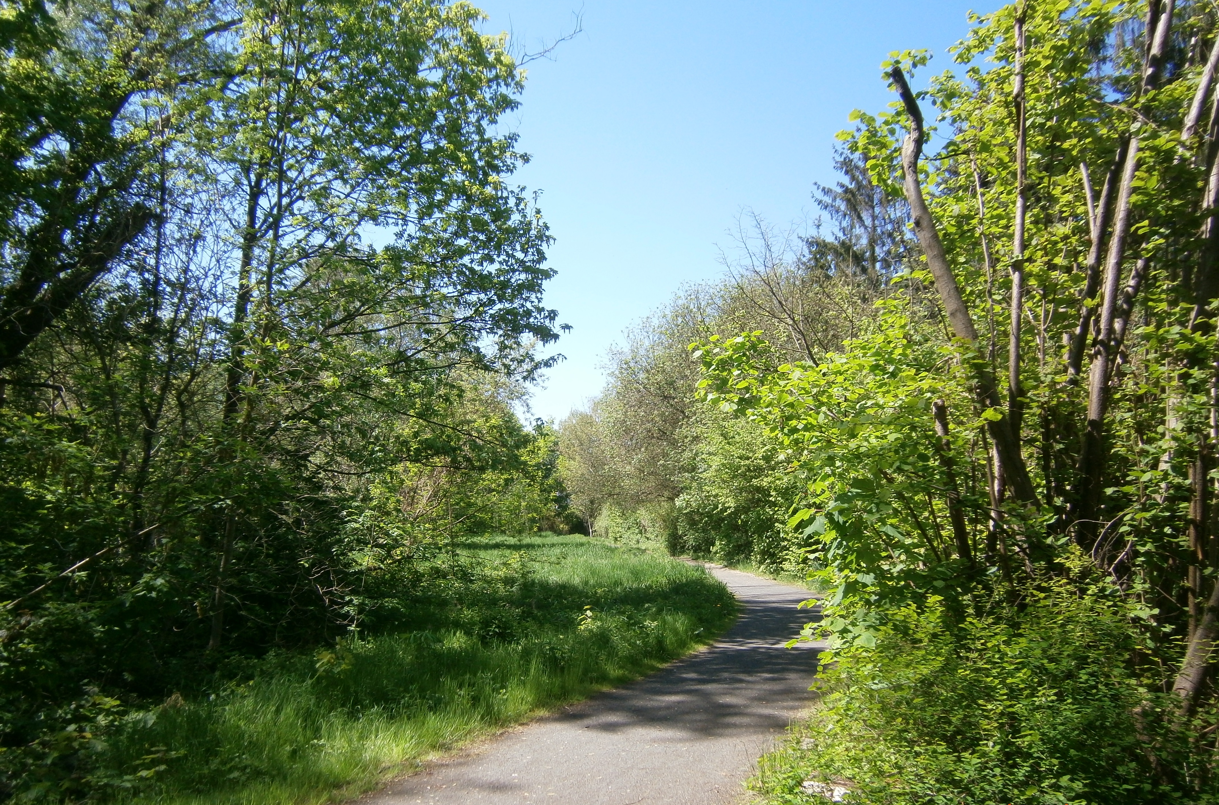 Der Barnimer Dörferweg ist ein Erholungs- und Wanderweg in Berlin und wird unter Obhut der Senatsverwaltung für Stadtentwicklung mit verschiedenen Institutionen betrieben. Er ist Teil der 20 Grünen Hauptwege mit der Nr. 13 und führt durch die nördlichen Ortsteilen von Berlin, die vor der Bildung von Groß-Berlin 1920 als Siedlungzentren und Vorrte und zuvor als Dörfer im Berliner Umland bestanden. Dieses Bild entstand auf Hermsdorfer Flur (Berlin-Hermsdorf) und zeigt den Weg am Tegeler Fließ im Landschaftsschutzgebiet Tegeler Fließ.